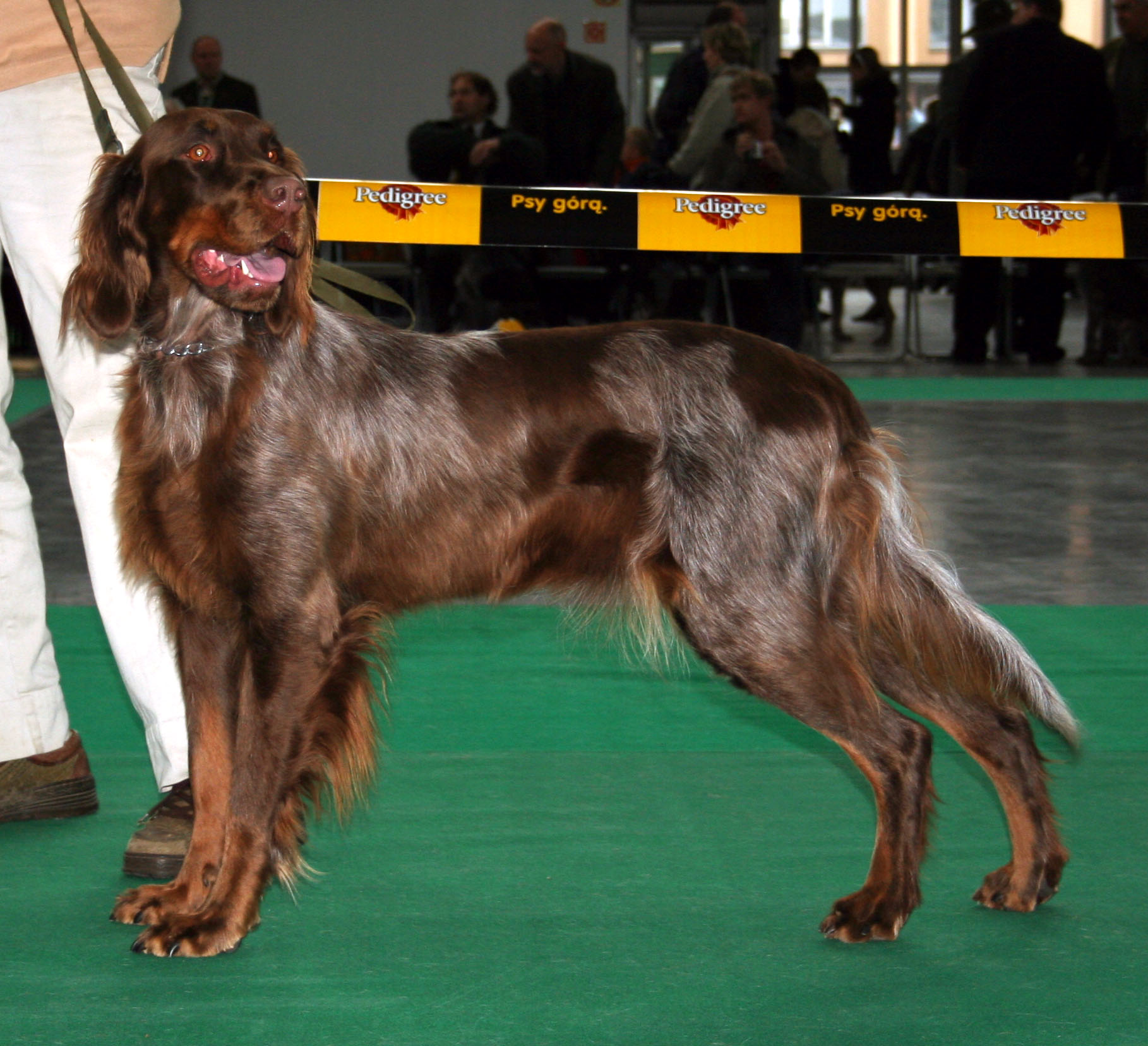 Epagneul_picard na Światowej Wystawie Psów Rasowych w Poznaniu